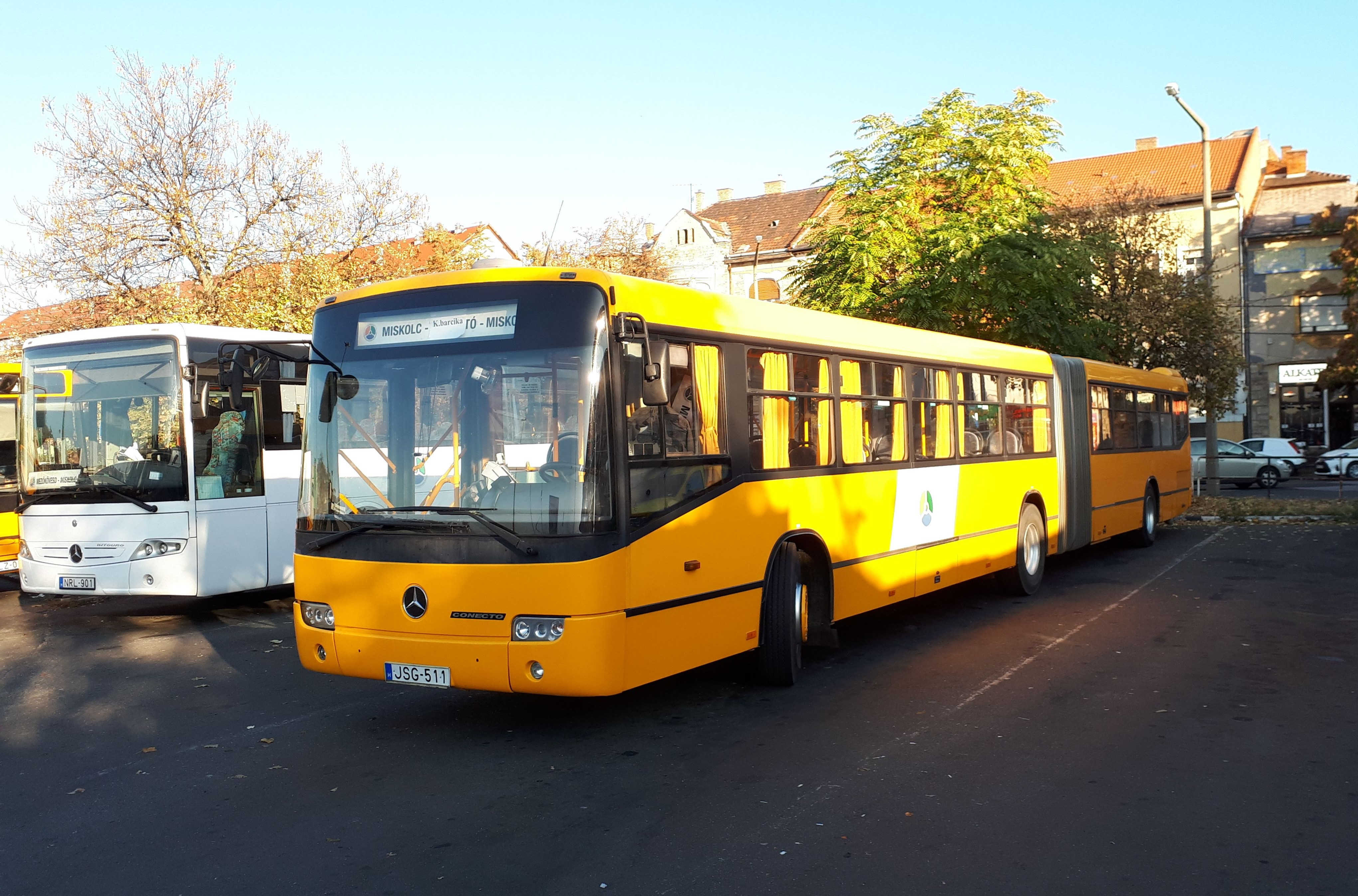 Az ÉMKK JSG-516 rendszámú Mercedes Conecto busza Miskolcon, a 3765-ös helyközi járaton.